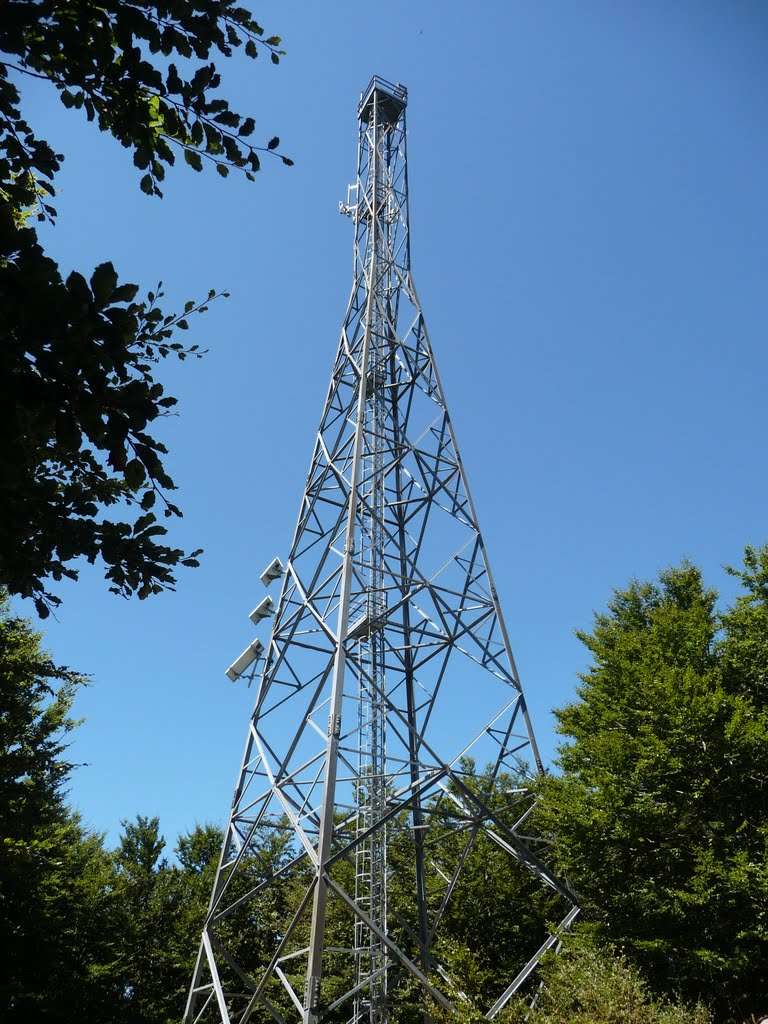 Antenna del monte pecoraro